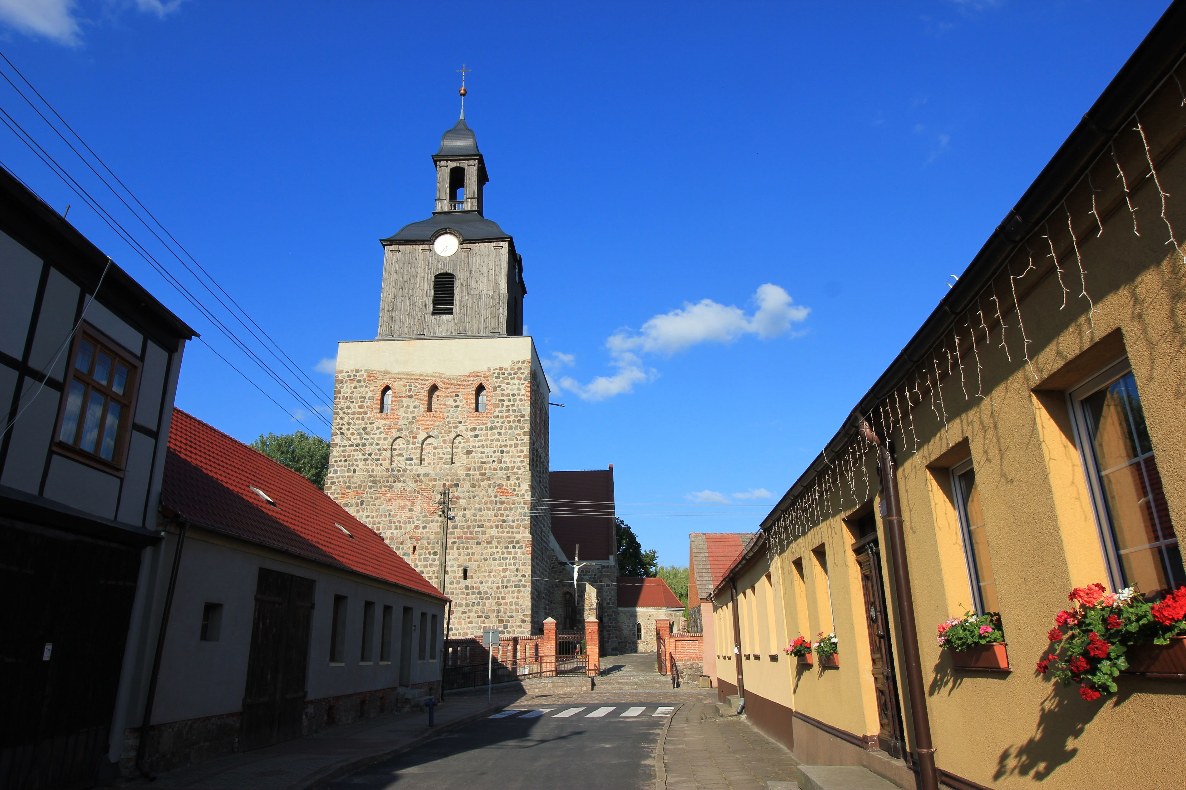 Stadtkirche in Moryń (Mohrin).